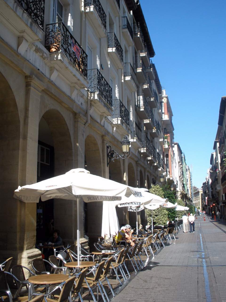 Calle Portales de Logroño